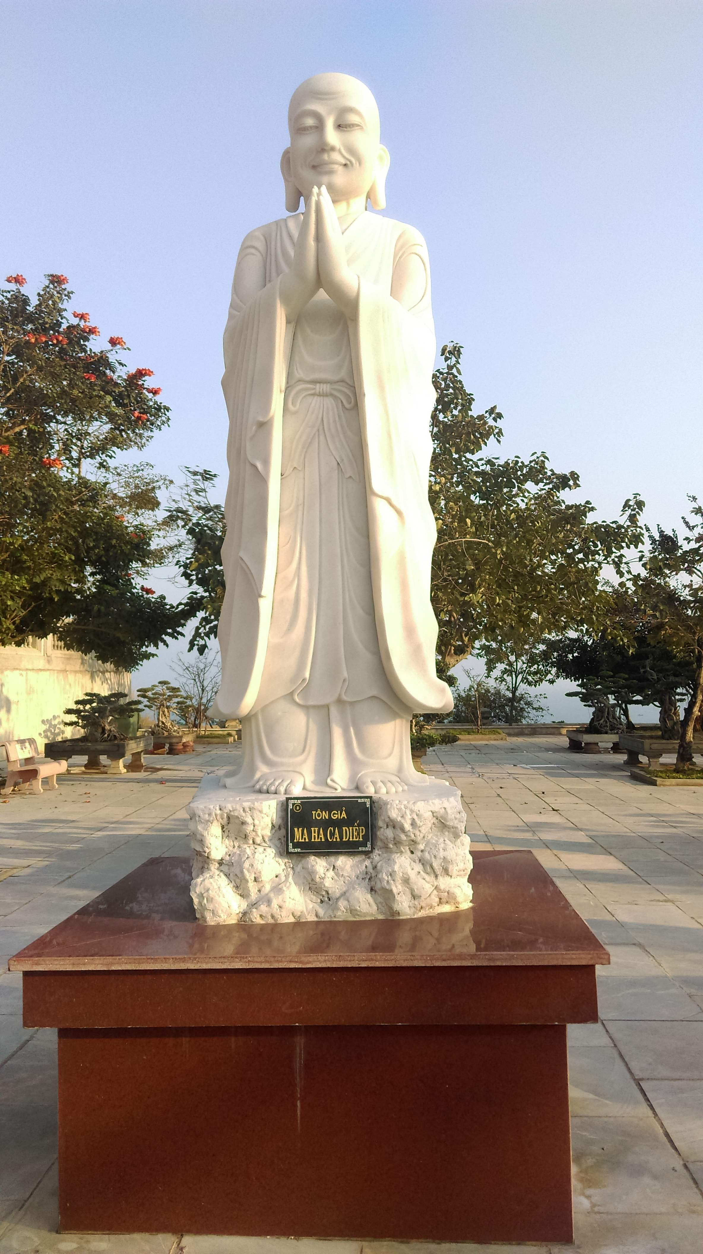 Ma Ha Ca Diếp, chùa Linh Ứng Sơn Trà, Đà Nẵng